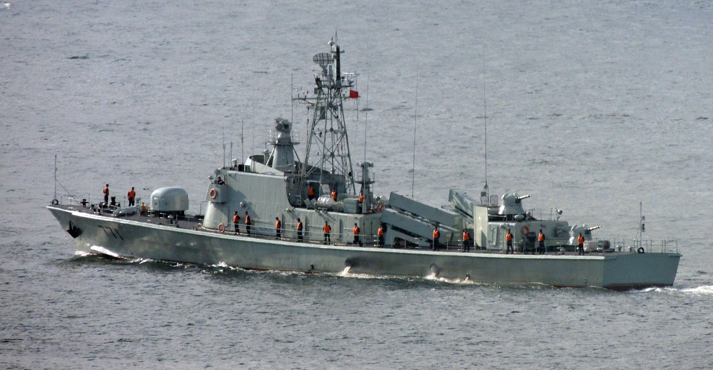 駐港部隊艦艇大隊037II型-771導彈艦